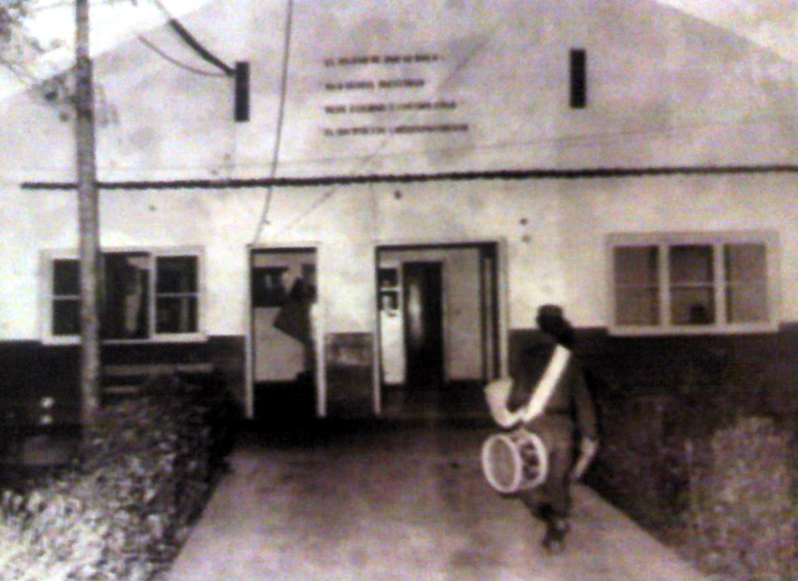 Sector del Regimiento donde se produjo el ataque de montoneros.